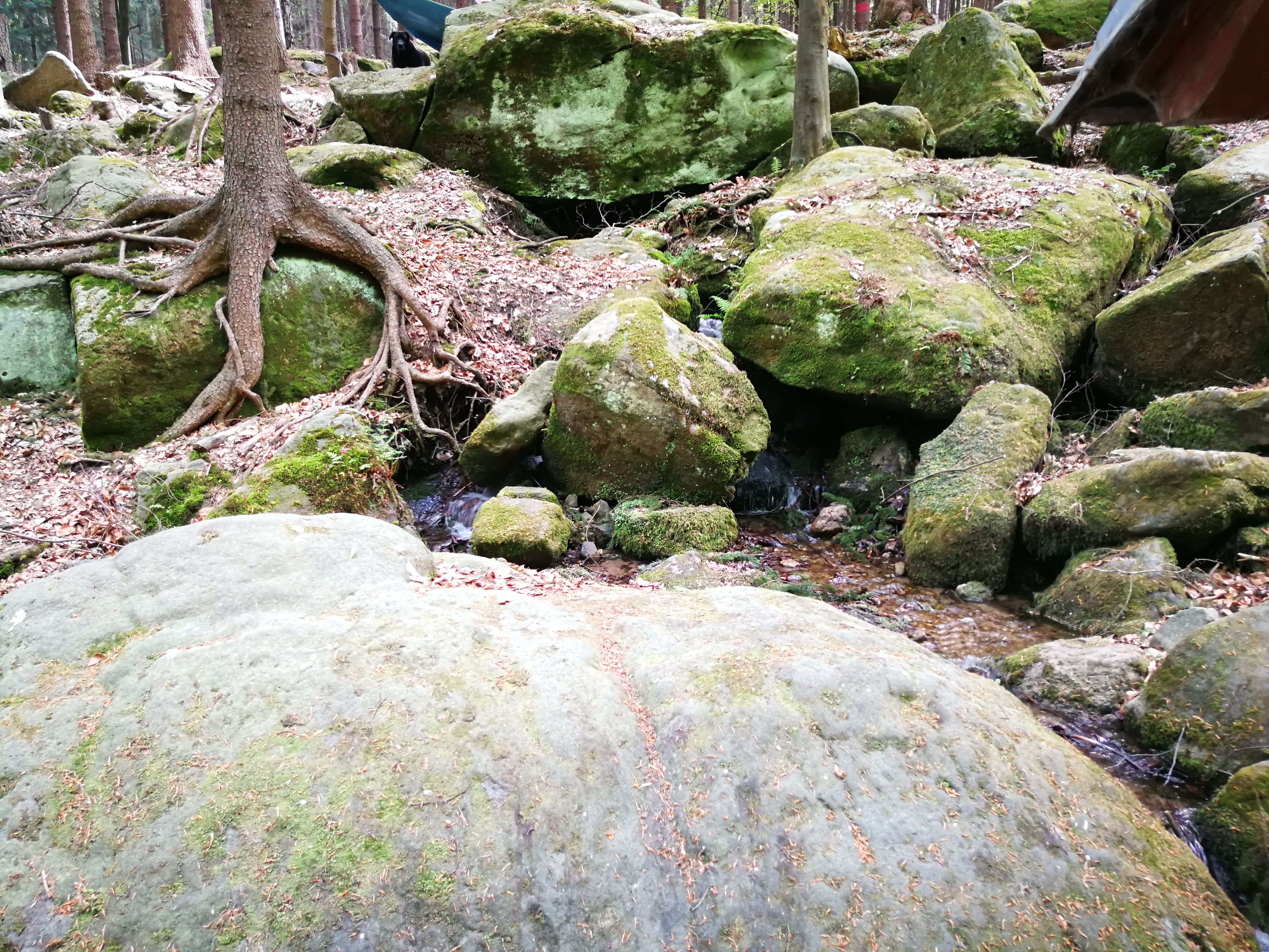 Farná stráň Project: Chráněná území.